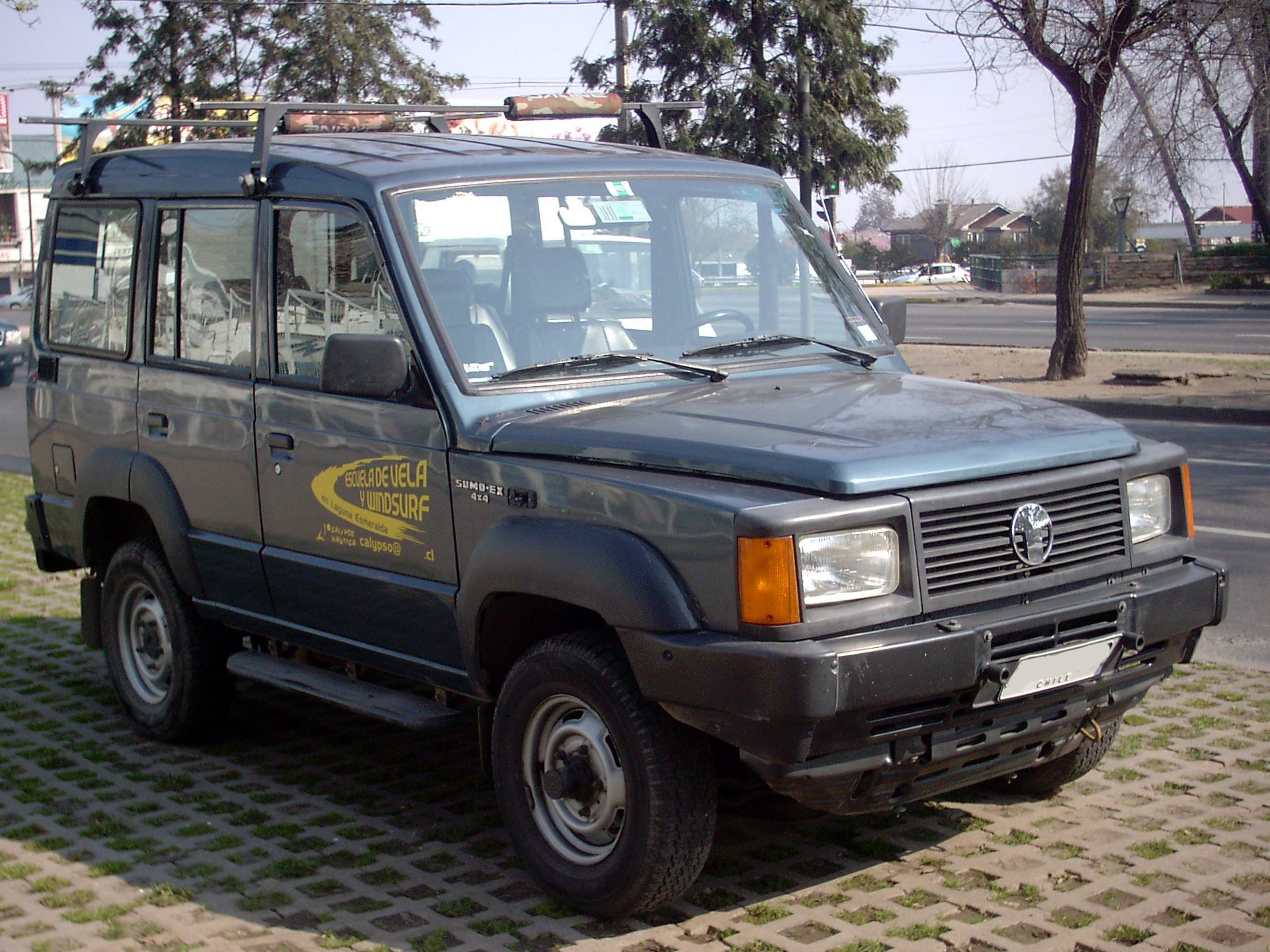 Tata Sumo EX 2.0 TDi 4x4 2001